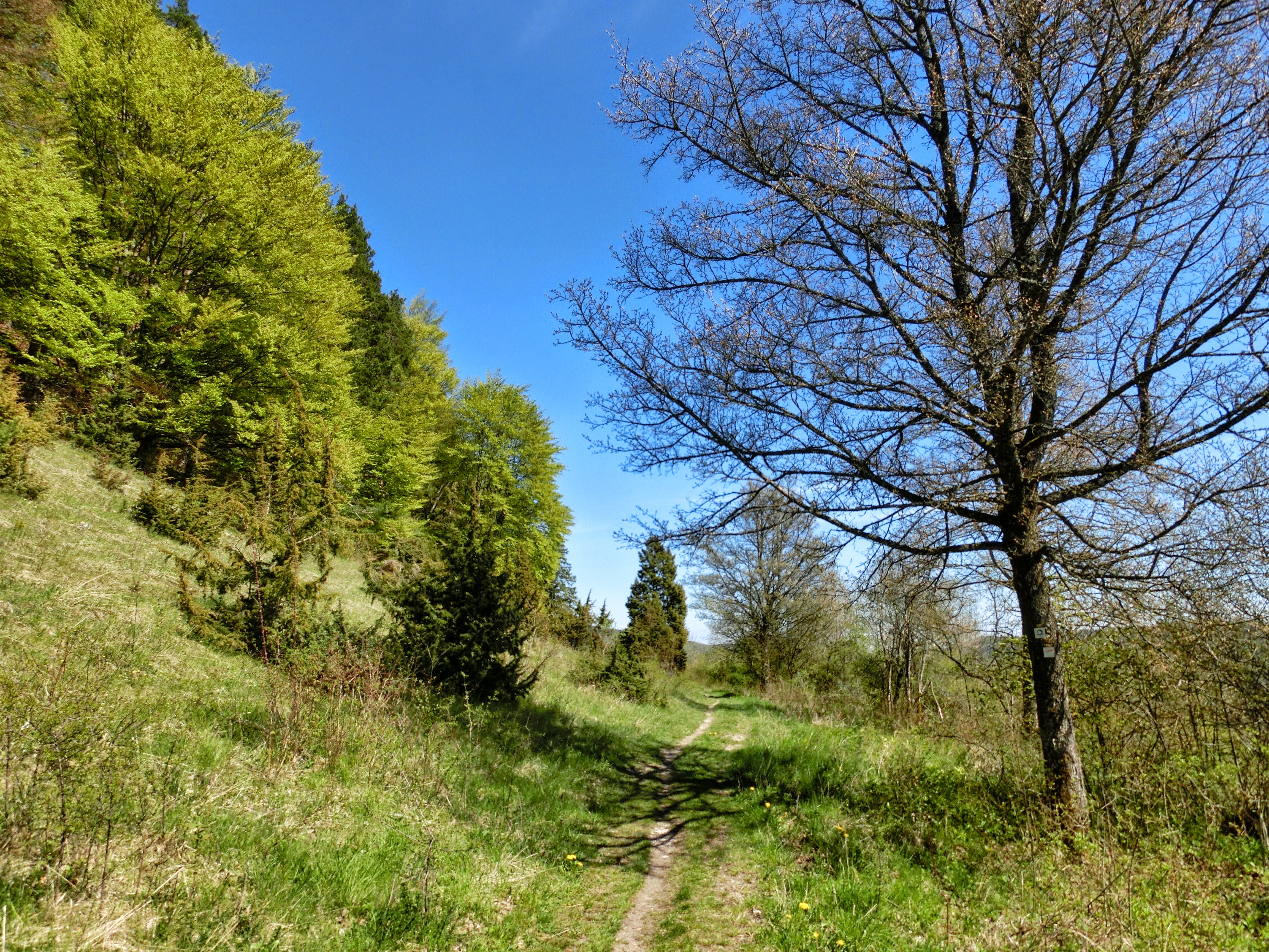 Deutschland (D) - Baden-Württemberg (BW) - Zollernalbkreis (BL) - Albstadt: Naturschutzgebiet Mehlbaum